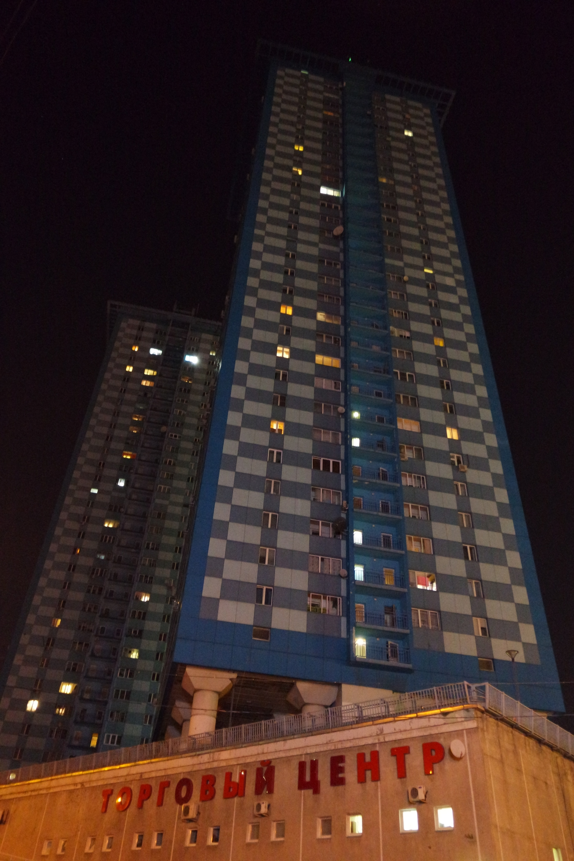 Жилые высотки-близнецы в Москве (Авиационная, 66, около метро Щукинская), объединённые стилобатом